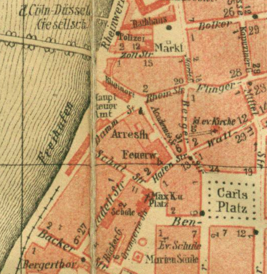 Ausschnitt Karte Düsseldorf (Carlstadt, Altstadt) mit Arresthaus und Feuerwehr an der Akademiestraße, August Hofacker, vor 1880 (Carlstadt, Altstadt)